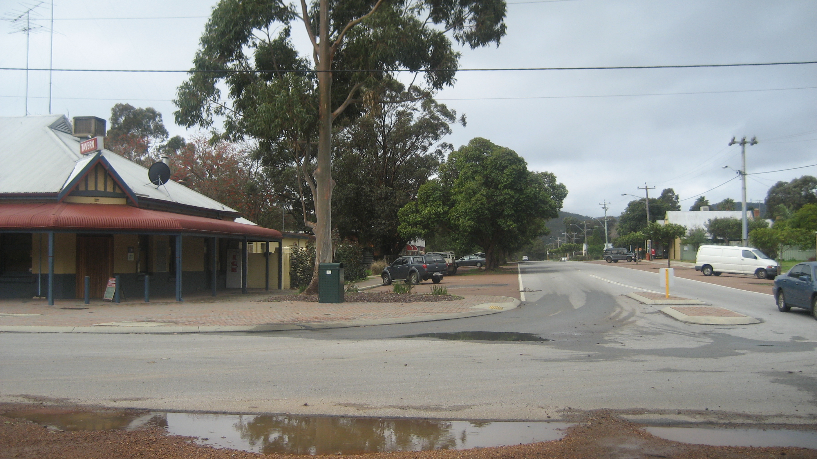 Serpentine, Western Australia